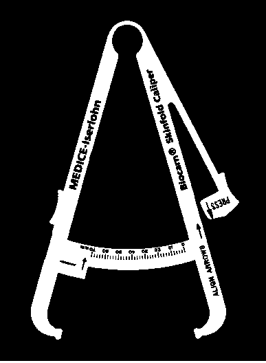 einfaches Hautfaltenmessgerät